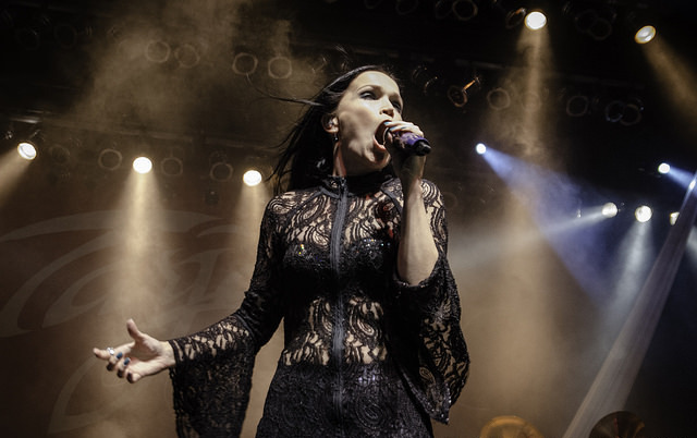 Tarja Turunen durante show em São Paulo